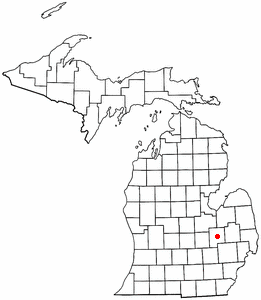 Flint, Michigan.